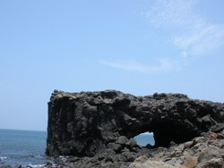 臺灣澎湖縣西嶼小門鯨魚洞